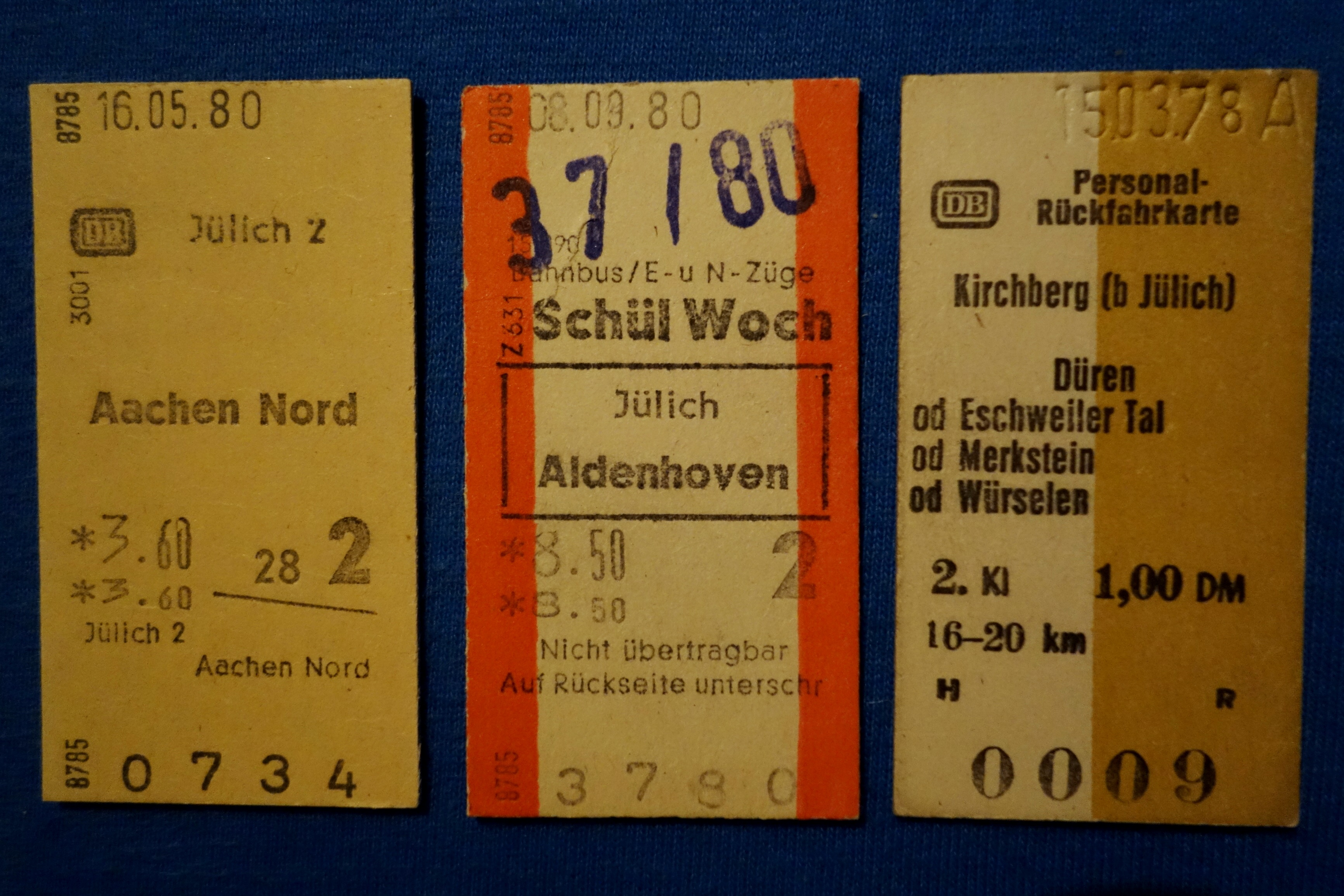 Bahn-Fahrkarten der Strecke Aachen Nord - Jülich aus den Jahren 1978 und 1980 im Edmondson'schen Format (aus Pappe): Eine gewöhnliche einfache Fahrt, eine Schüler-Wochenkarte und eine Fahrkarte mit DB-Personal-Ermäßigung